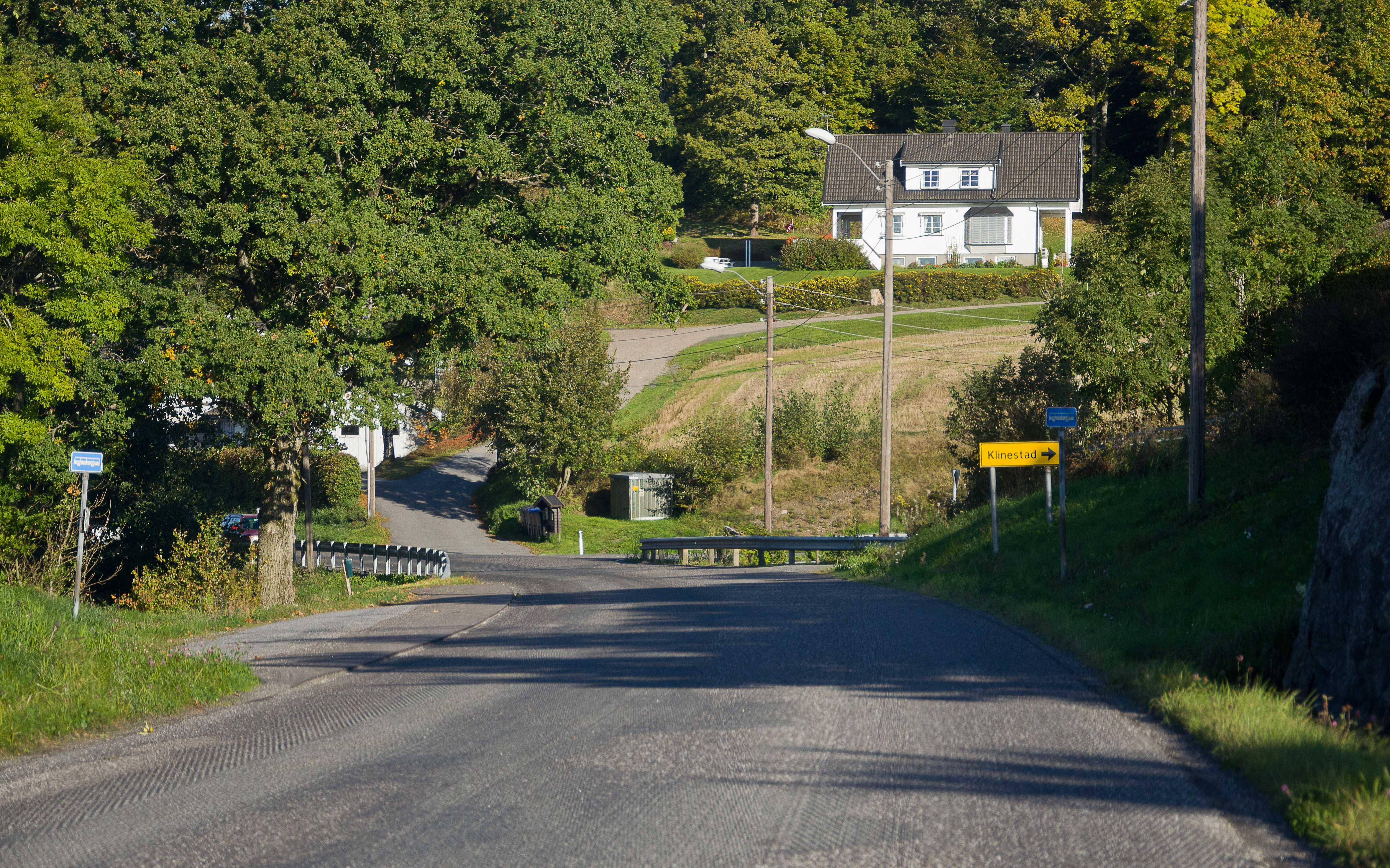 Vestfolds fylkesvei 305 Kodalveien, ved avkjøringen til Hotvedtveien mot Klinestad i Sandefjord